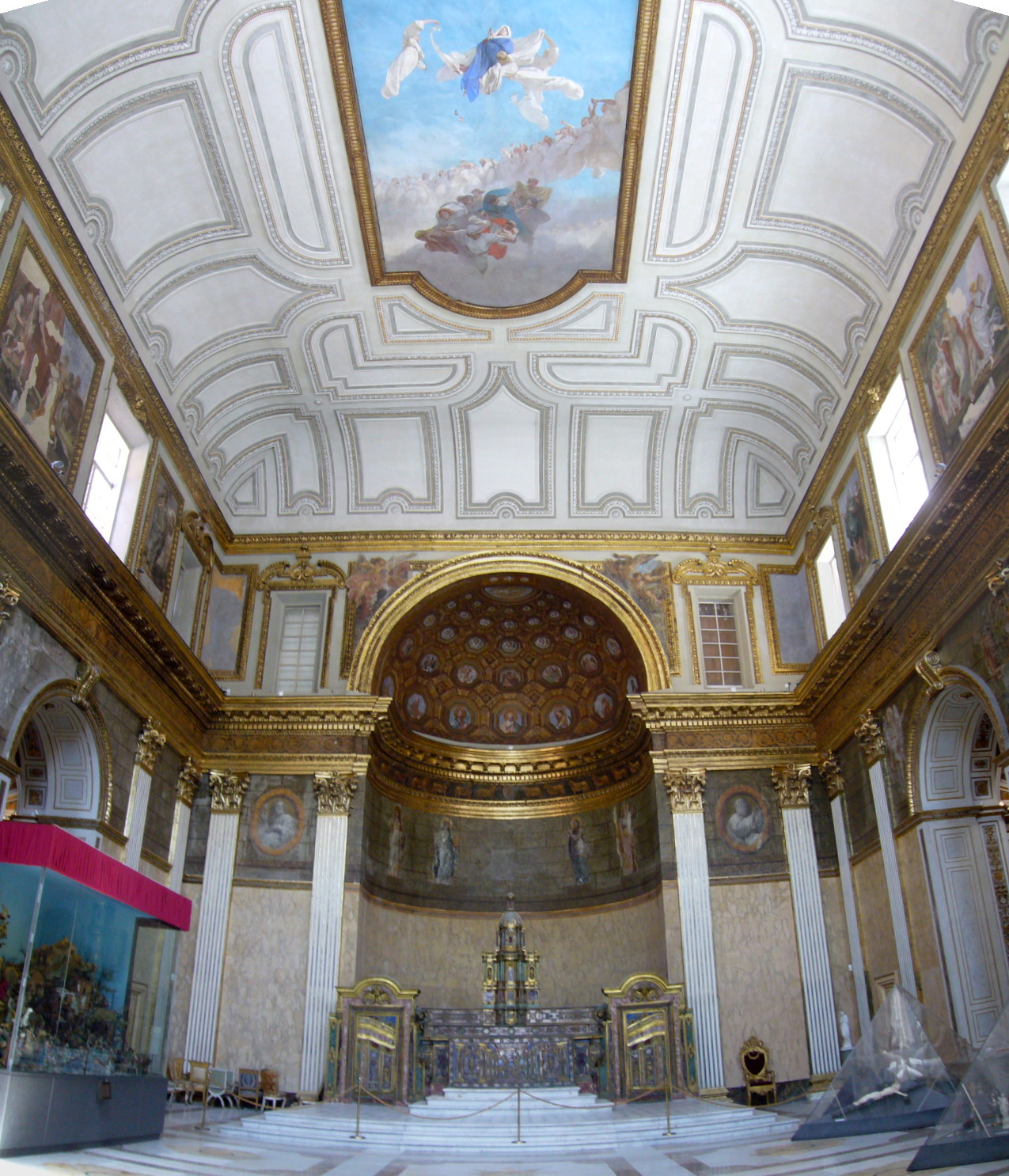 Napoli, Palazzo reale: Cappella reale